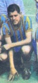 Miguel Allende